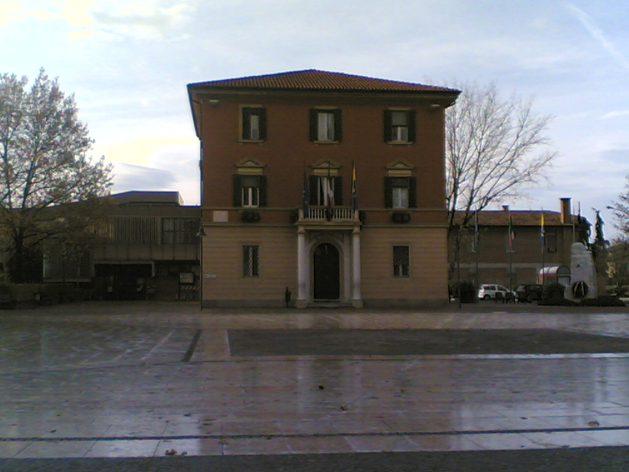 municipio di calderara di reno